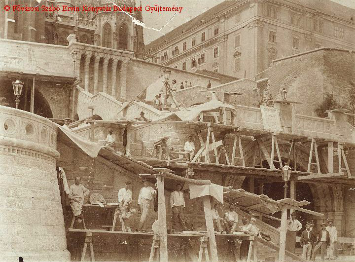 A Halászbástya építése 1895-1902 között